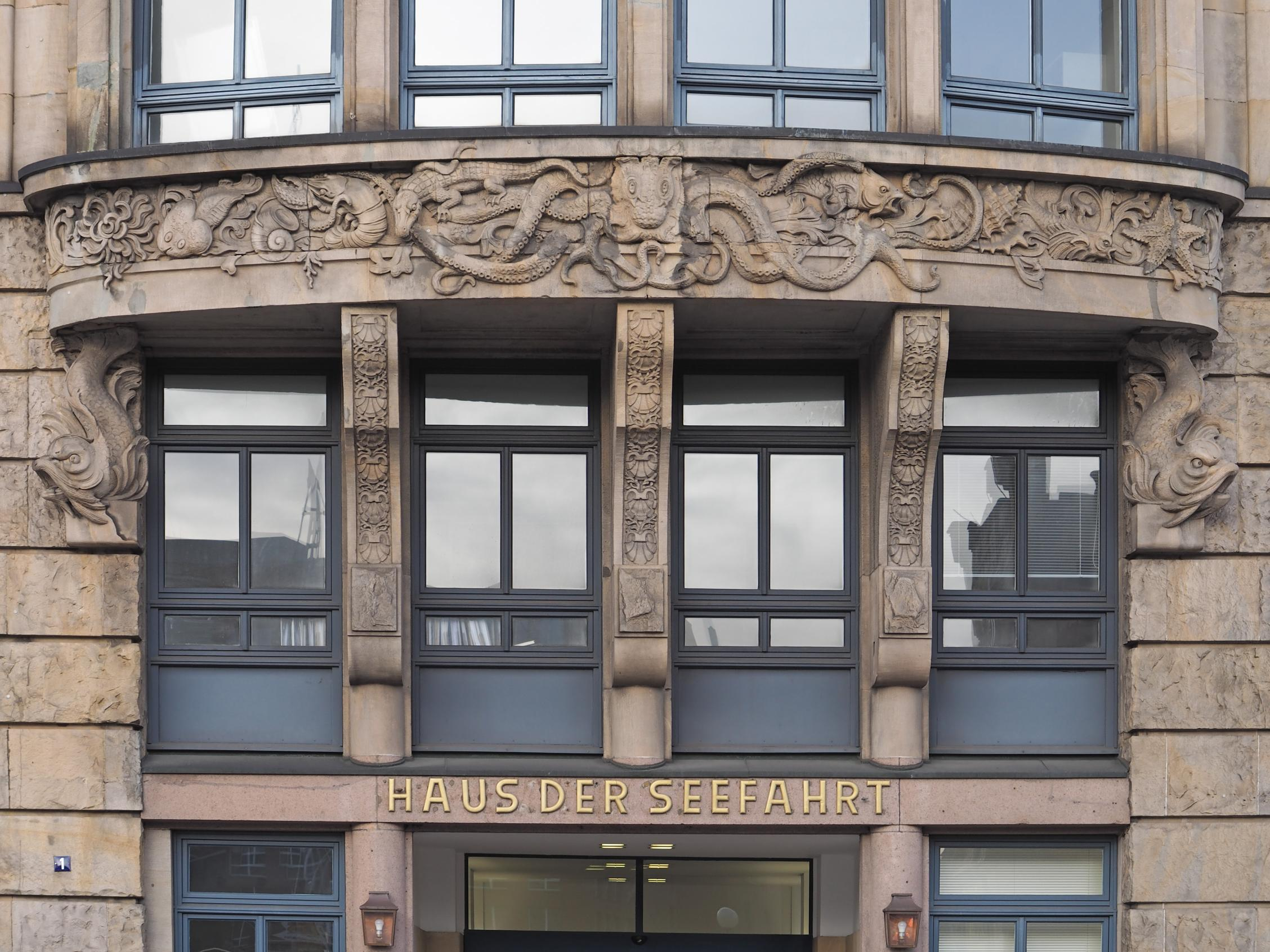 Hamburg, Haus der Seefahrt, Detail, Foto: November 2015